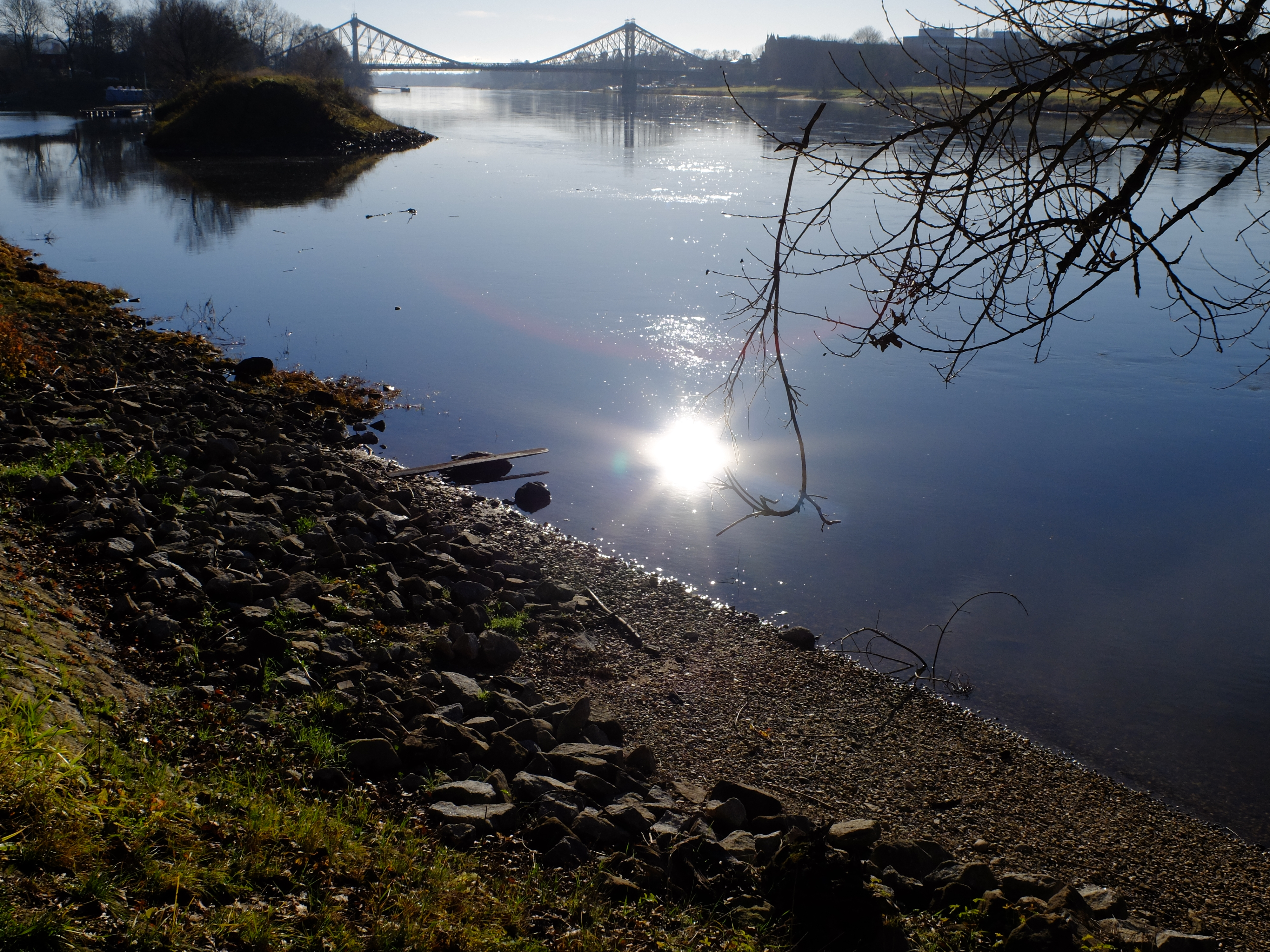 Loschwitzer Elbufer: Blick auf die Einfahrt zum Loschwitzer Hafen und das Blaue Wunder